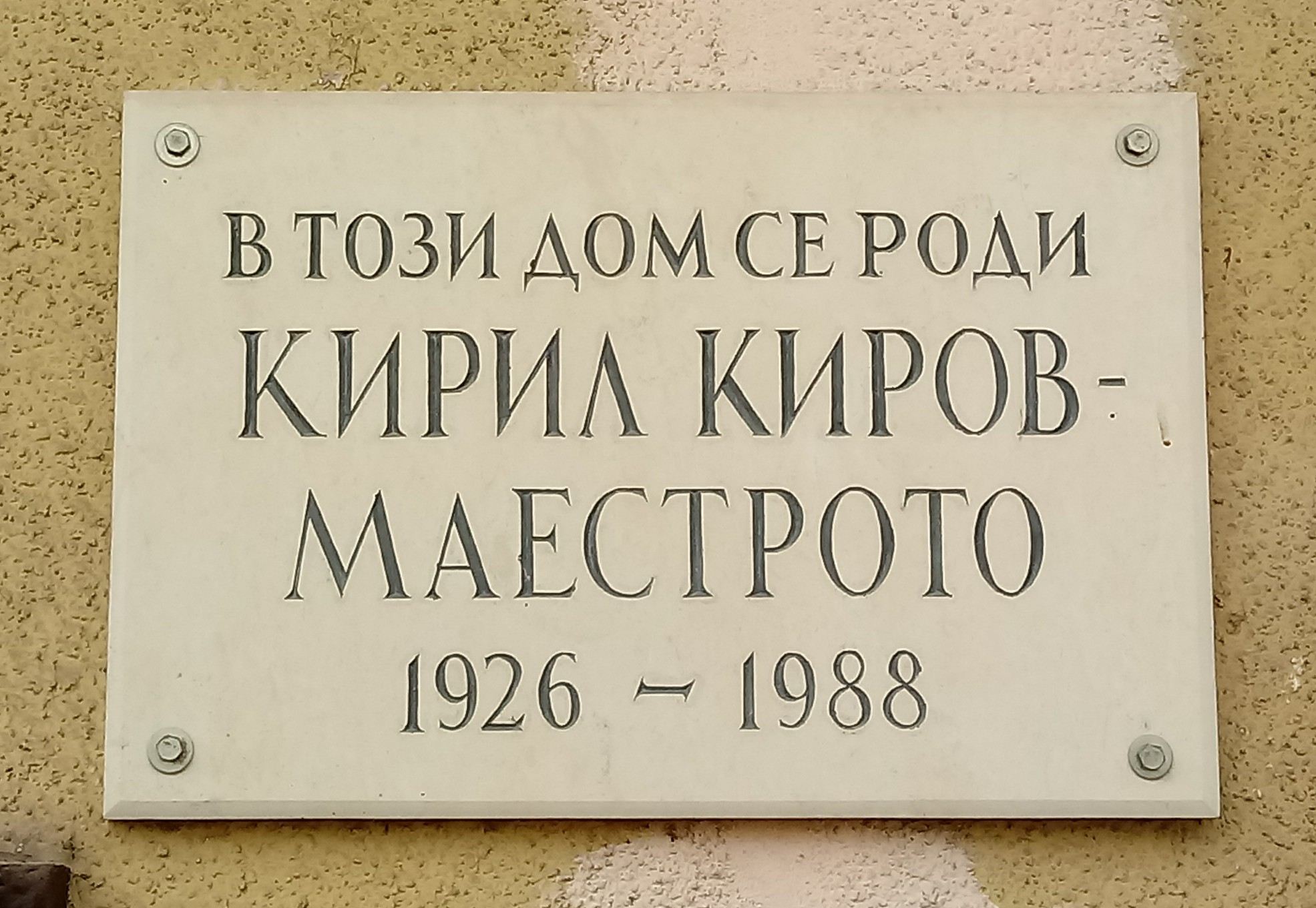 Maestro Kiril Kirov memorial plaque, Lovech